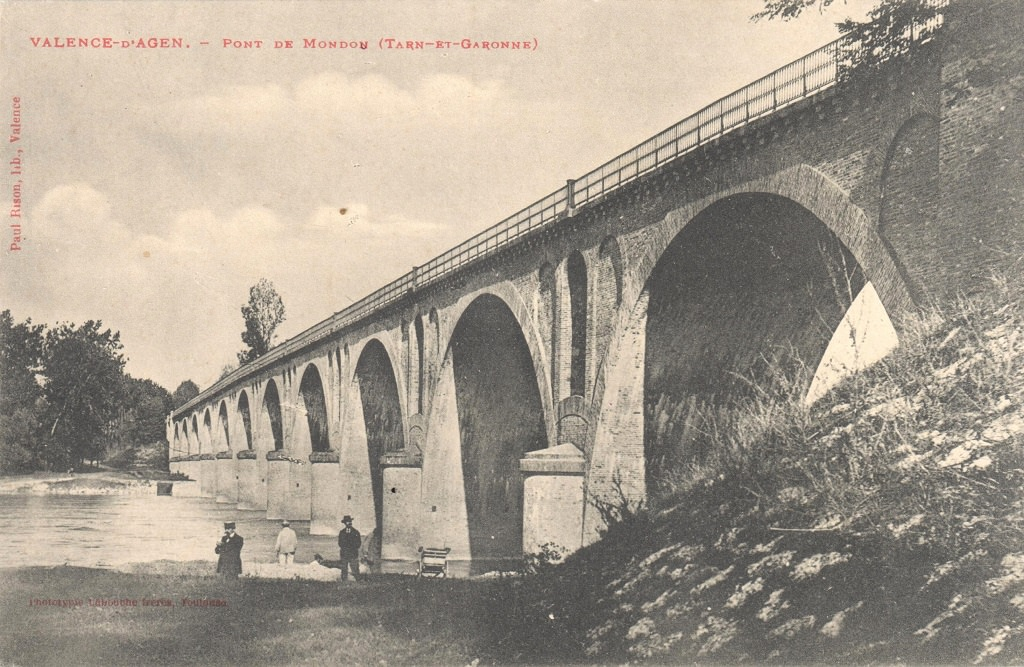 pont